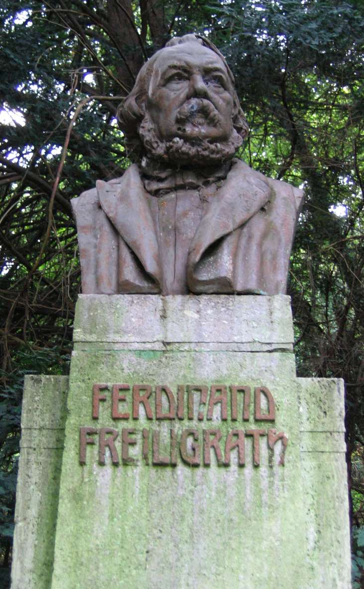 Freiligrath-Denkmal in Remagen-Rolandswerth